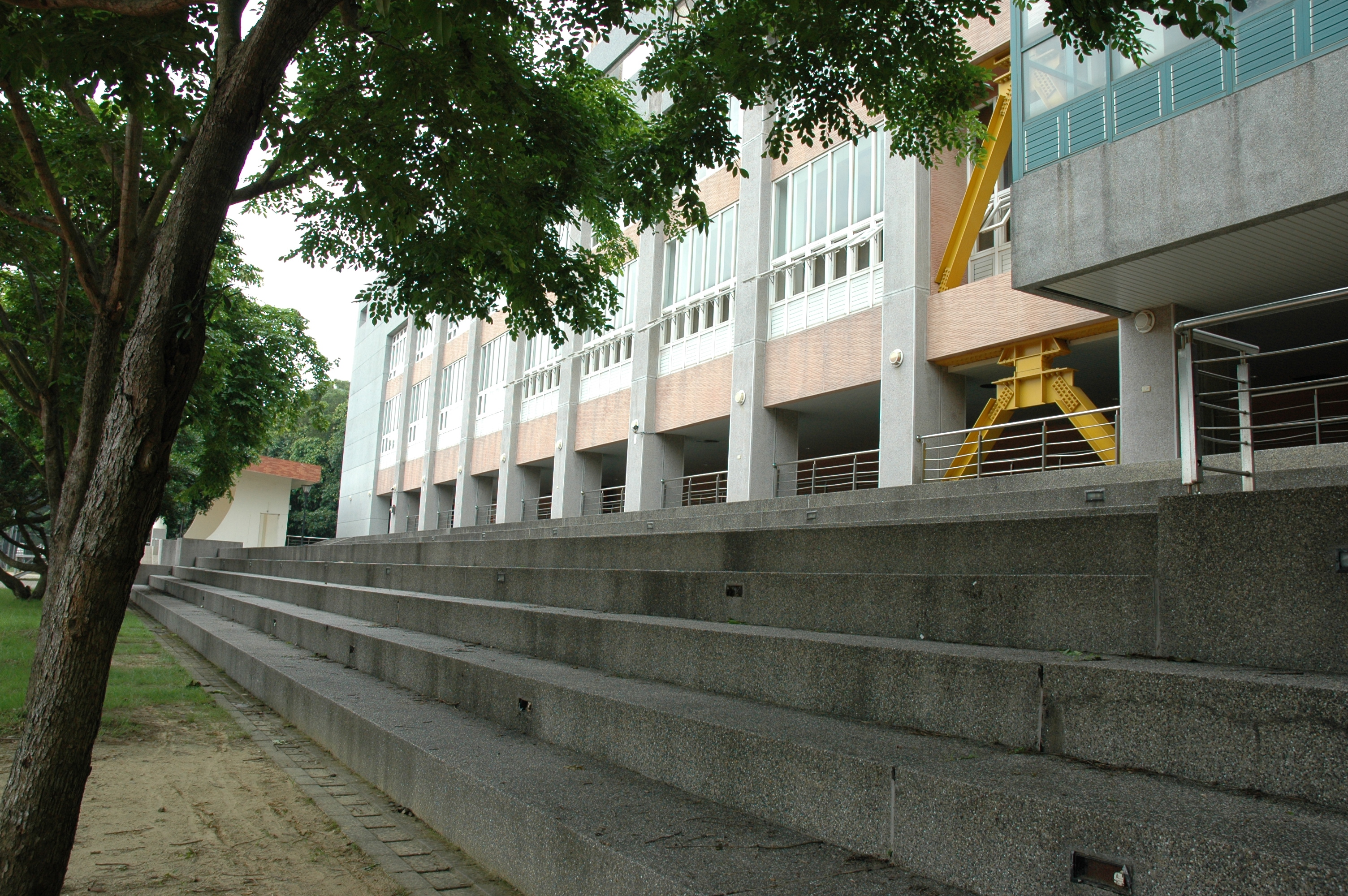 中華大學工程二館